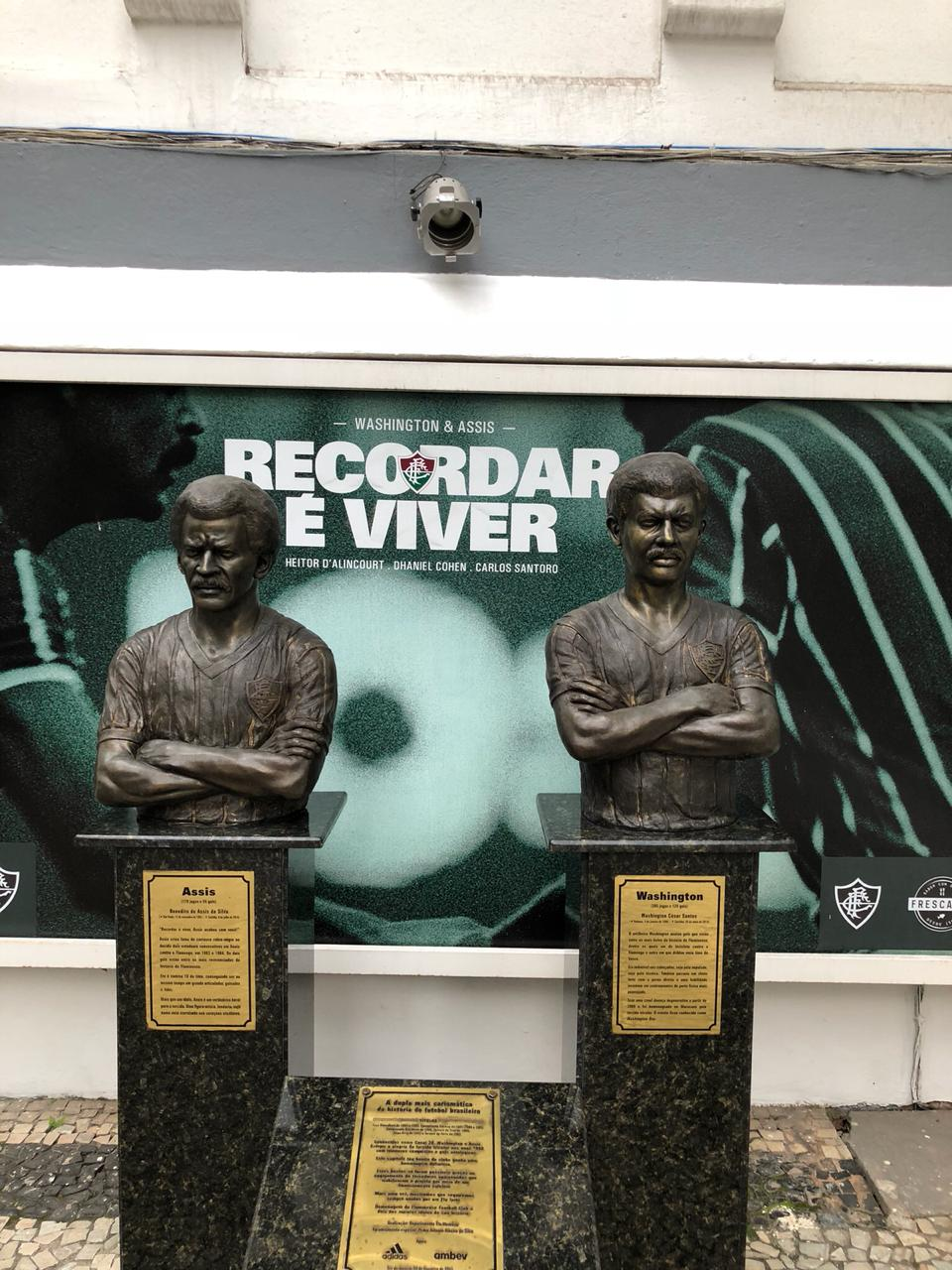 Bustos de Assis e Washington, o "Casal 20", no Fluminense Football Club.